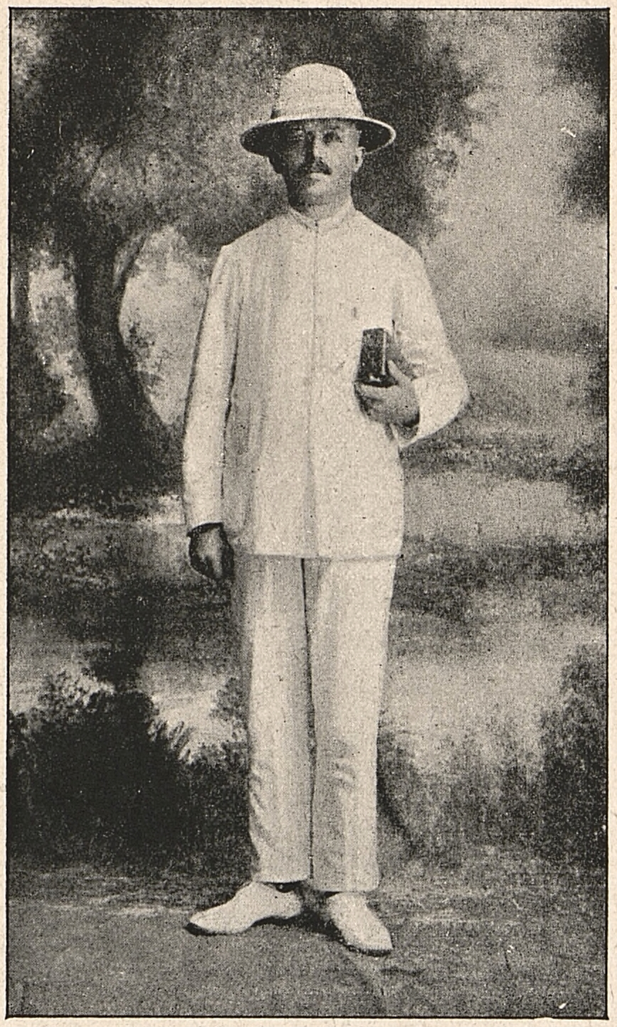 Alois Josef Svojsík 1875–1917 duchovní, cestovatel, spisovatel